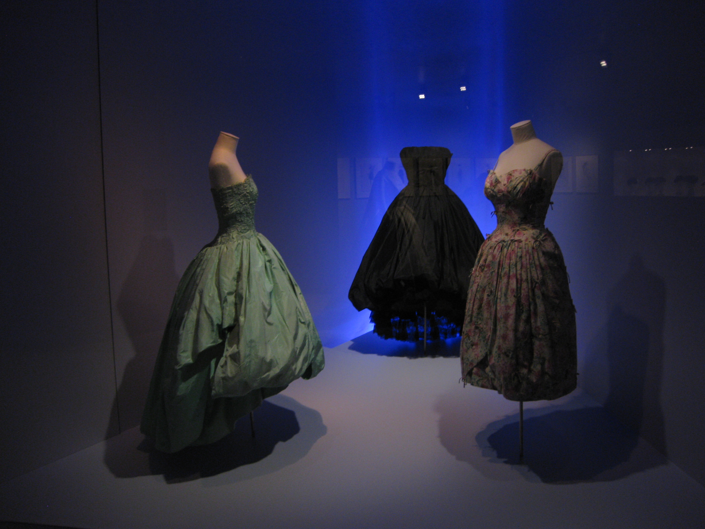 Exposició Balenciaga y la alta costura en Barcelona, proximidades y distancias. Col·lecció tèxtil Antoni de Montpalau